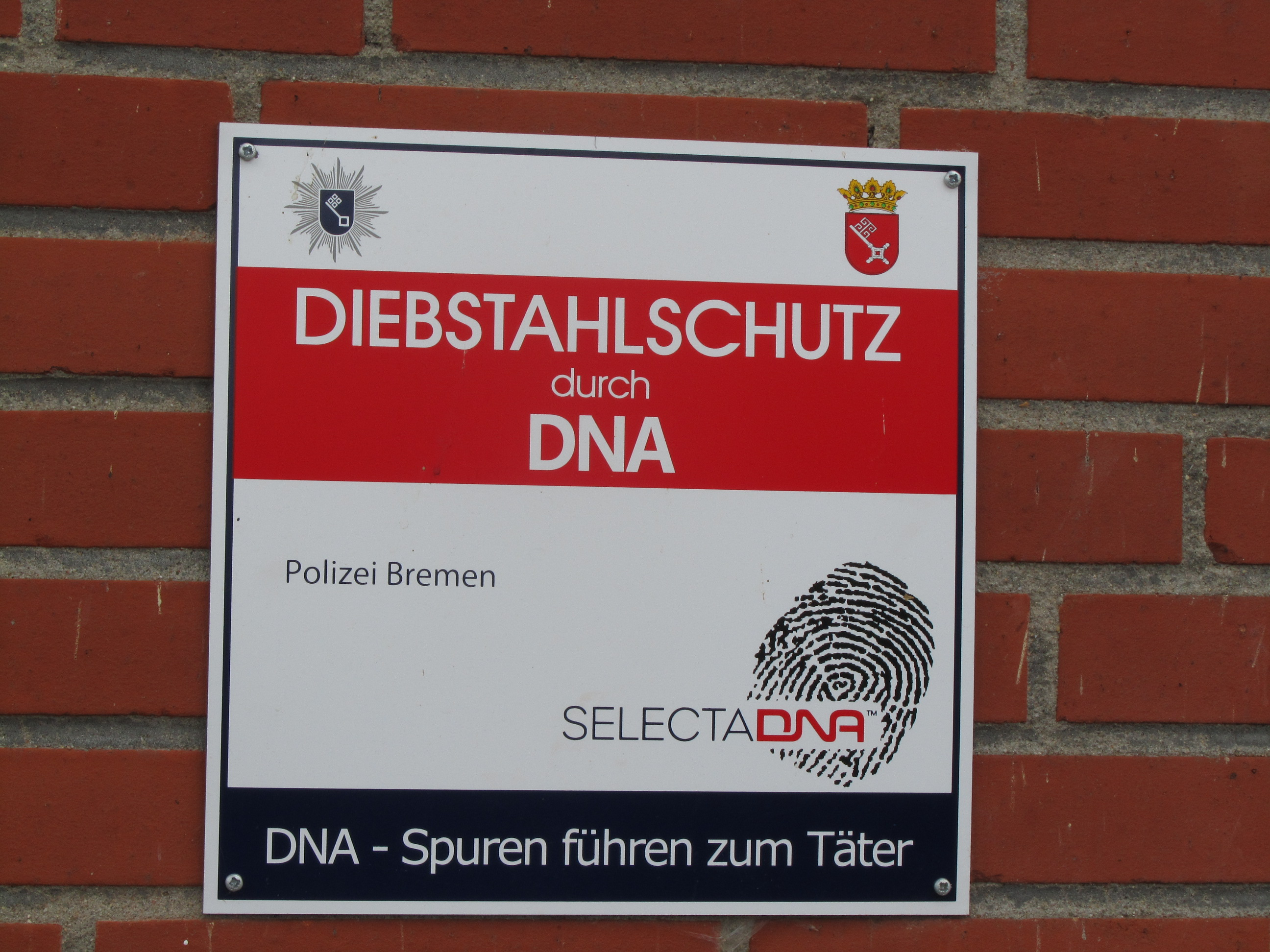 Bremen; an der Weser; bei der DLRG